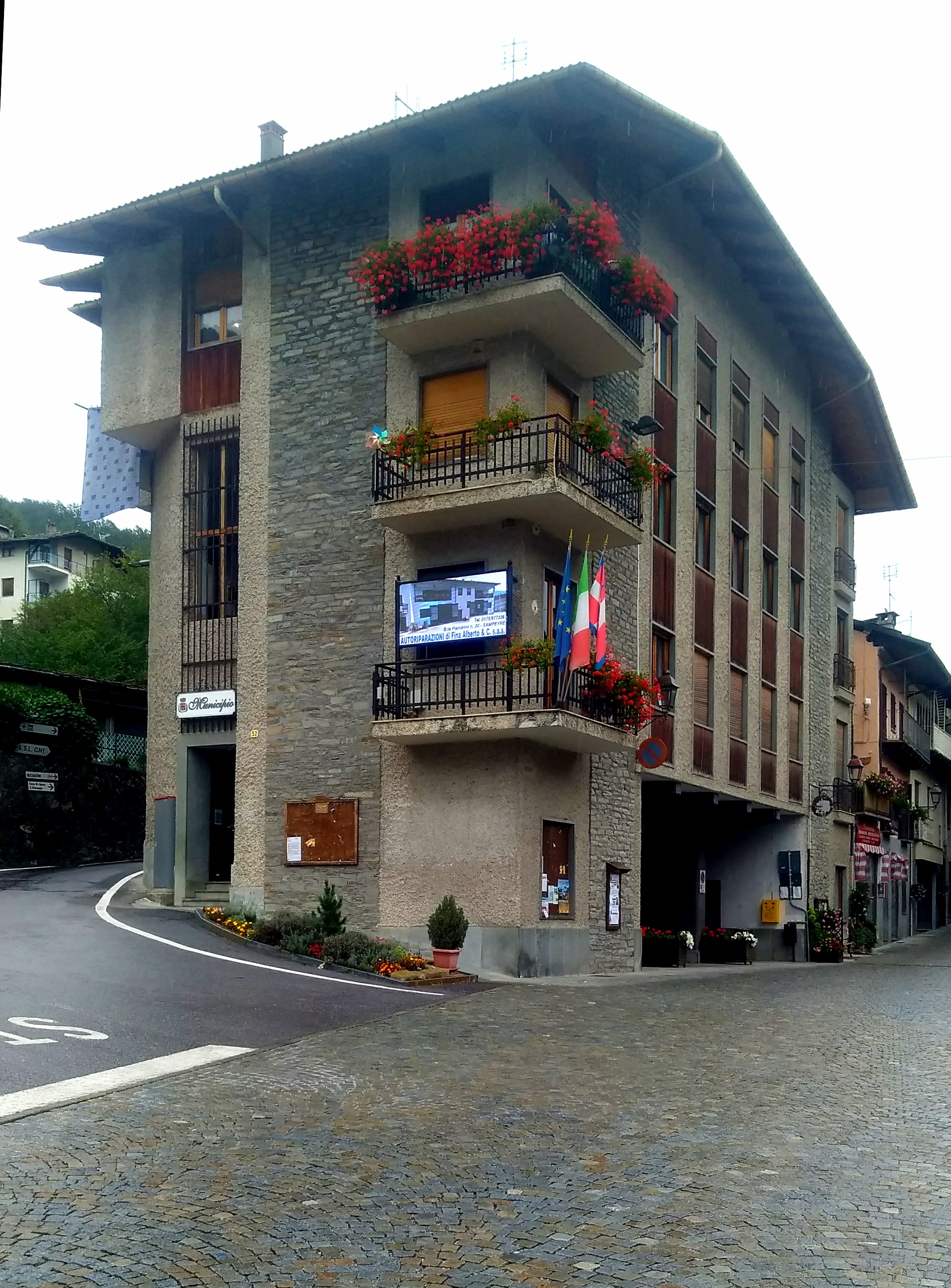 Sampeyre (CN): Il municipio